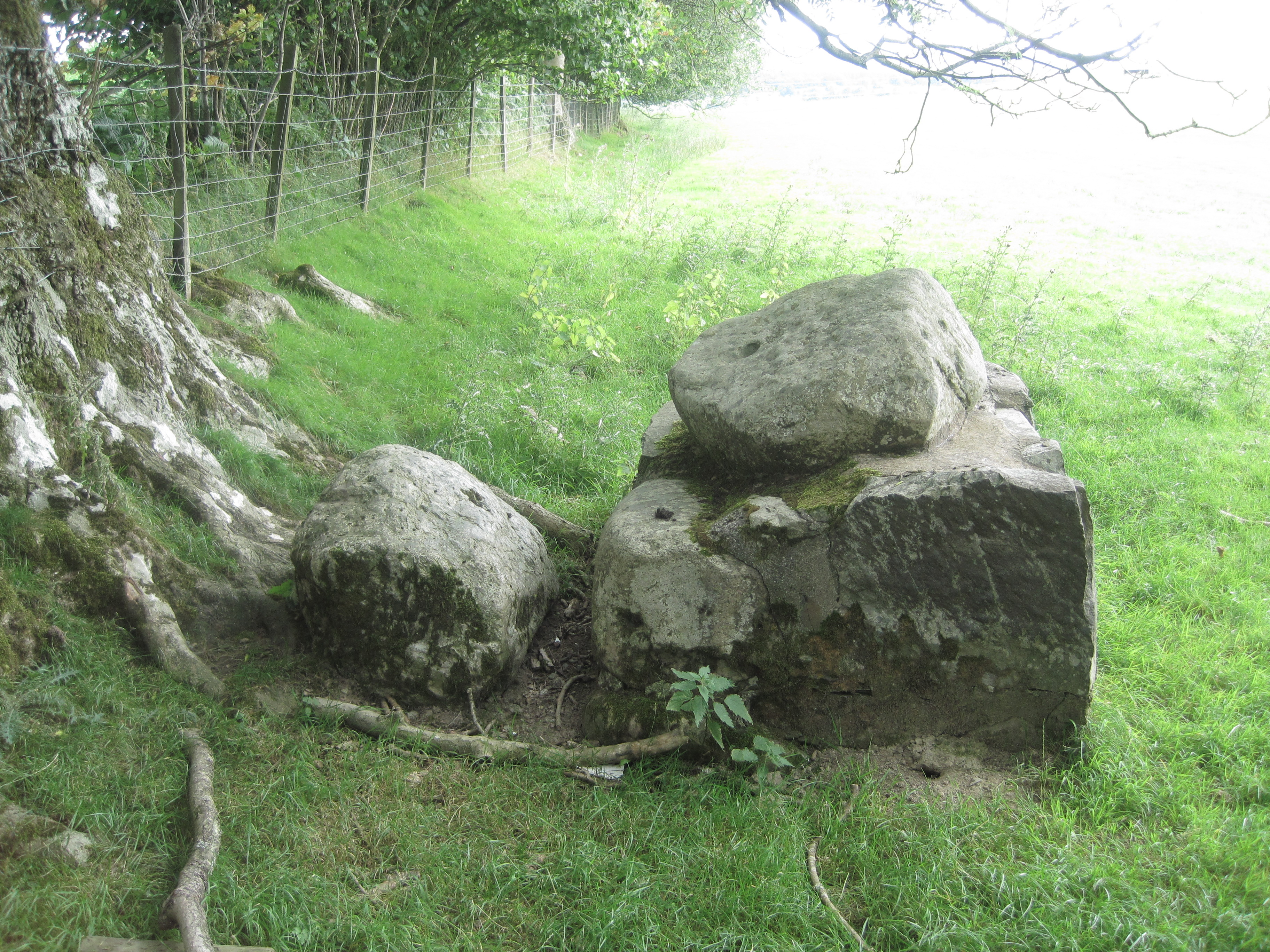 Bwrdd y Tri Arglwydd Bryneglwys Sir Ddinbych Cymru. Man cyfarfod a ffin tair arglwyddiaeth: Glyndyfrdwy, Rhug a Ial. Gerllaw ceir olion siambr gladdu megalithig.